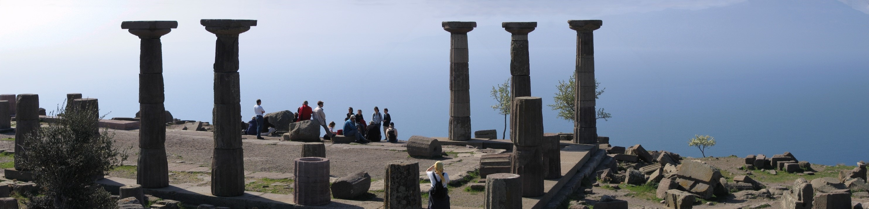 Blick vom Athenatempel der Ruinenstadt Assos (Türkei) auf die schemenhaft erkennbare, benachbarte griechische Insel Lesbos. Selbst fotografiert im März 2005, GNU-FDL